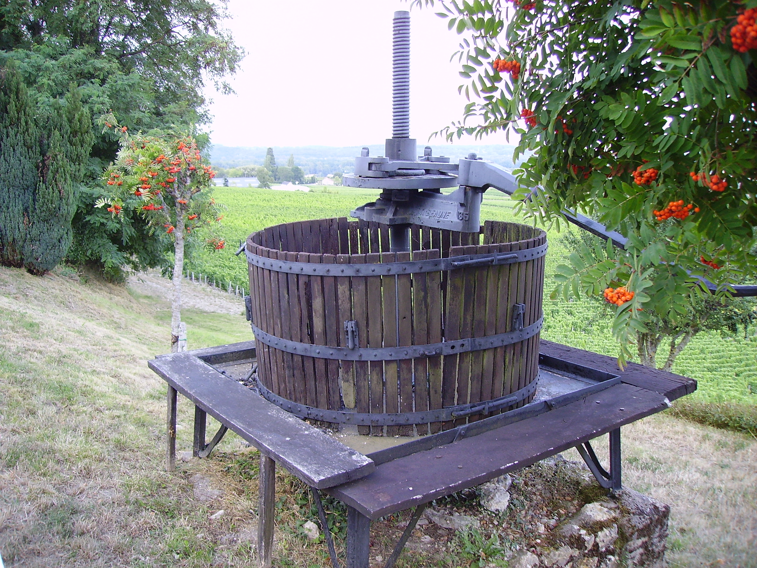 Ancien pressoir vinicole à vis verticale Gaillot décoratif, au bord d'une route ; Sancerre, Cher, France.